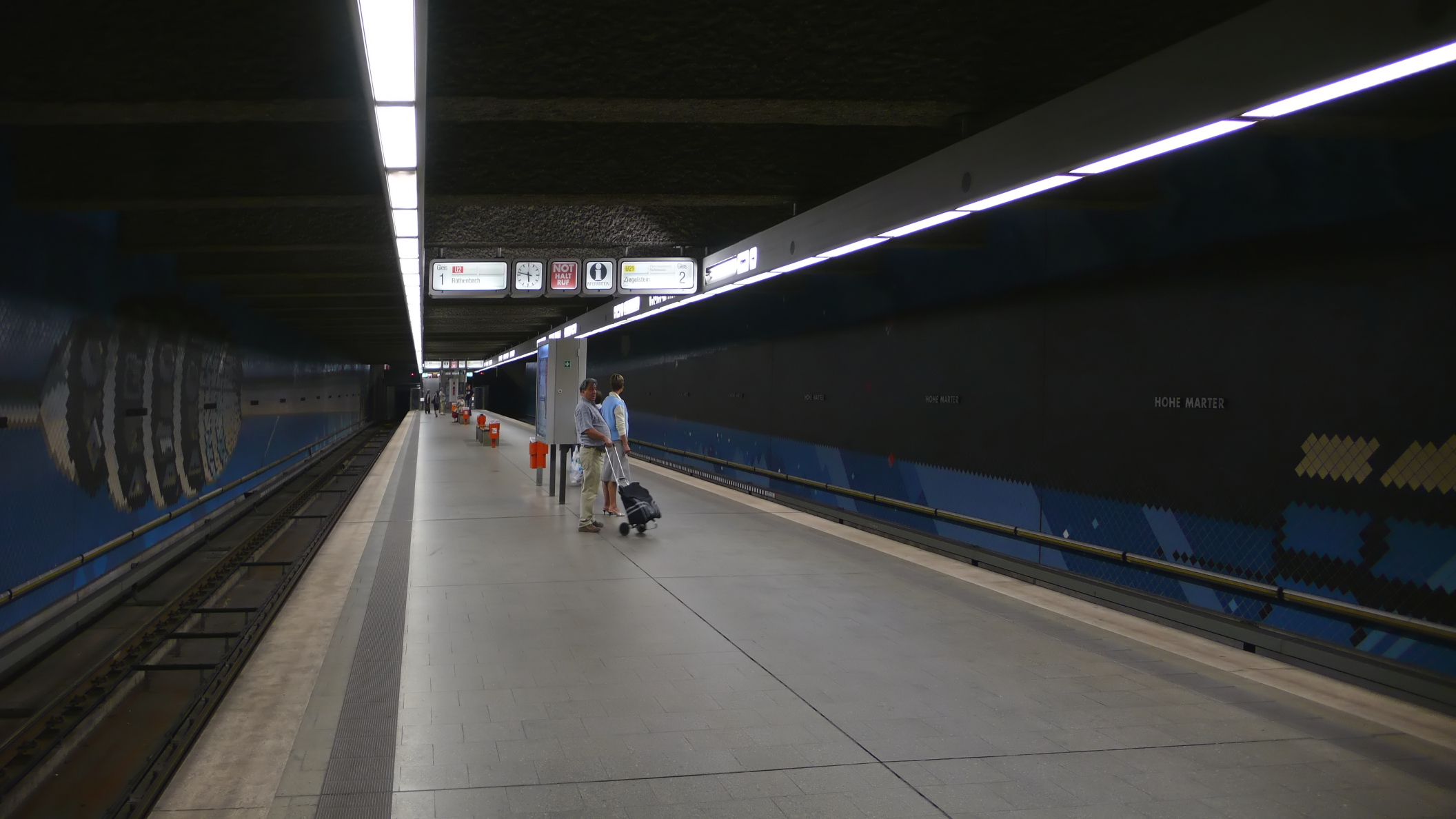 U-Bahnhof Hohe Marter der U-Bahn Nürnberg, Bahnsteigebene, Blick von Südwesten